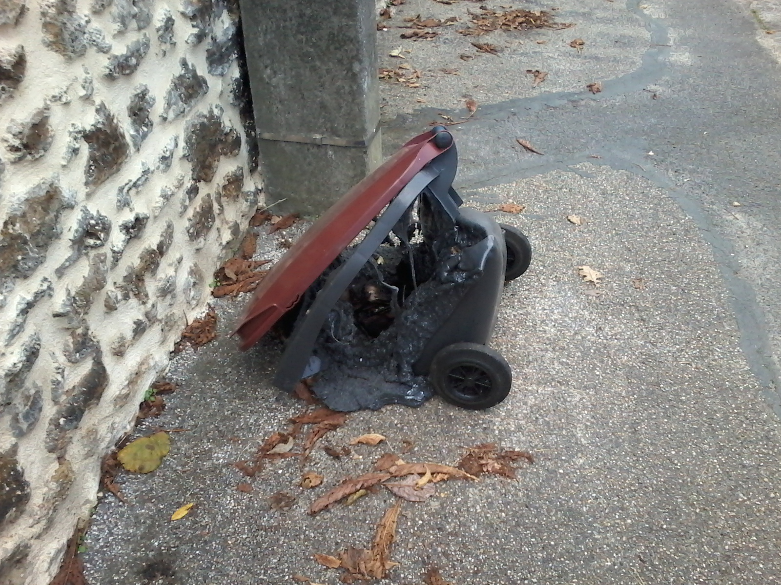 Poubelle brûlée en France, sans raison évidente.